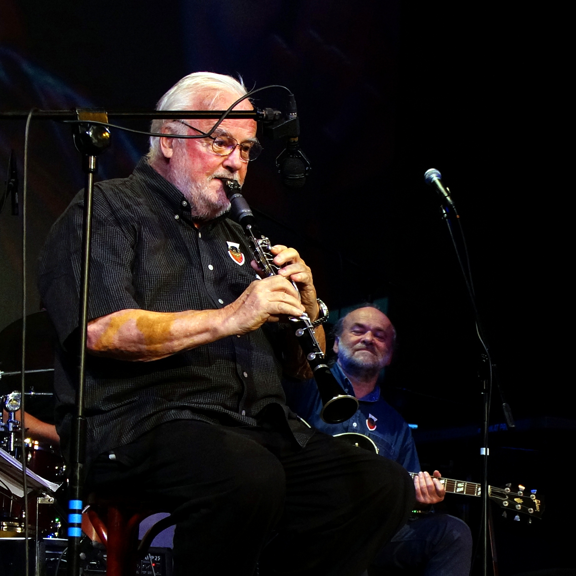 Gorzów Wlkp., 30 lat Małej Akademii Jazzu. Koncert okolicznościowy na deskach Teatru im Juliusza Osterwy. Na zdjęciu z Leszkiem Dranickim.